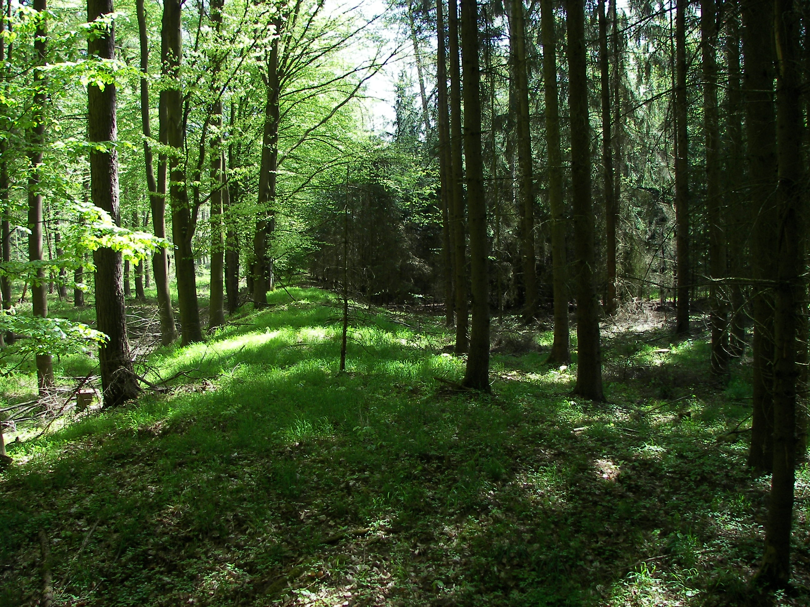 Der Obergermanische Limes bei Lich, Hessen; am 4. Mai 2006 um 13:30 Uhr selbst fotografiert.